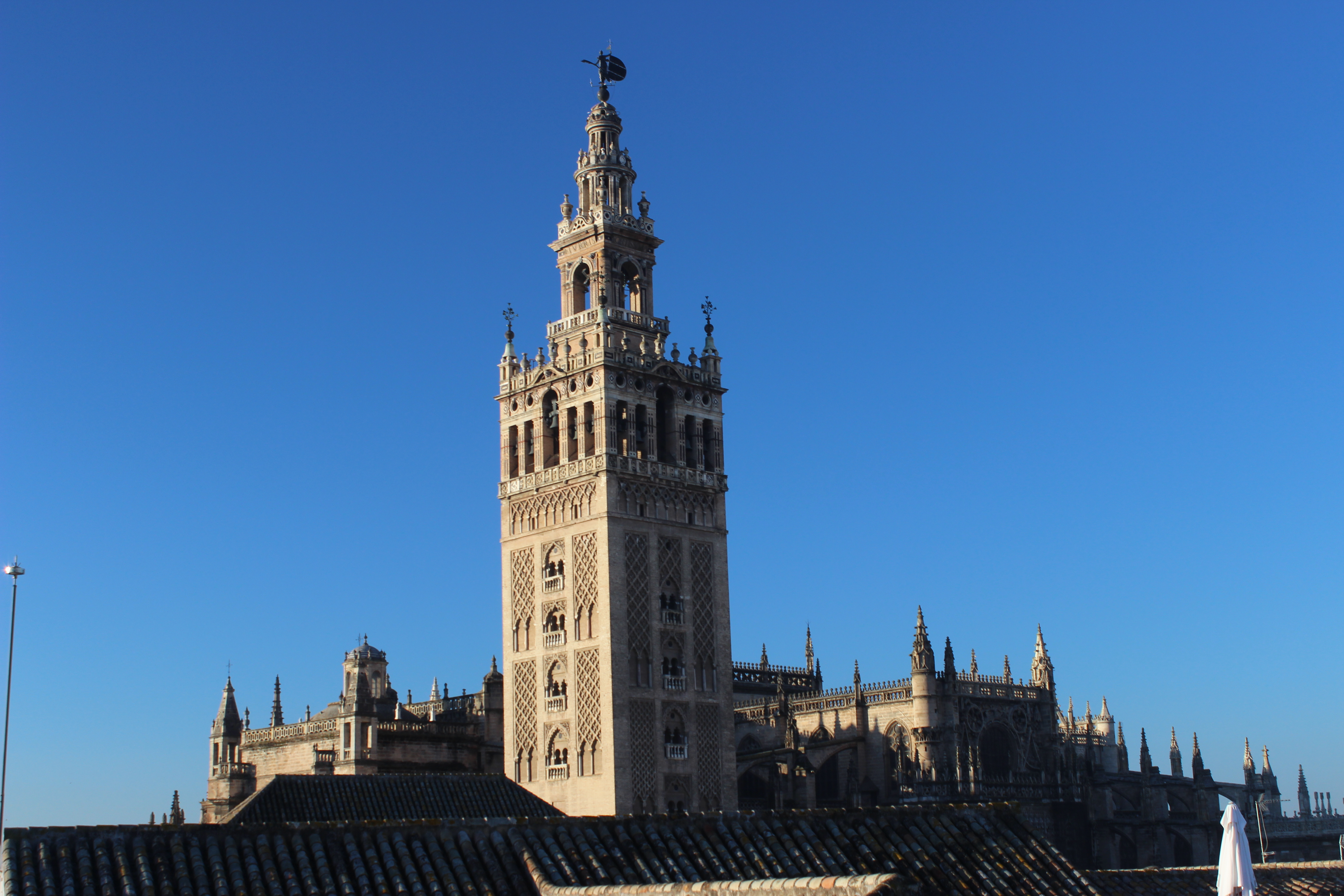 Sevilla, la Giralda.